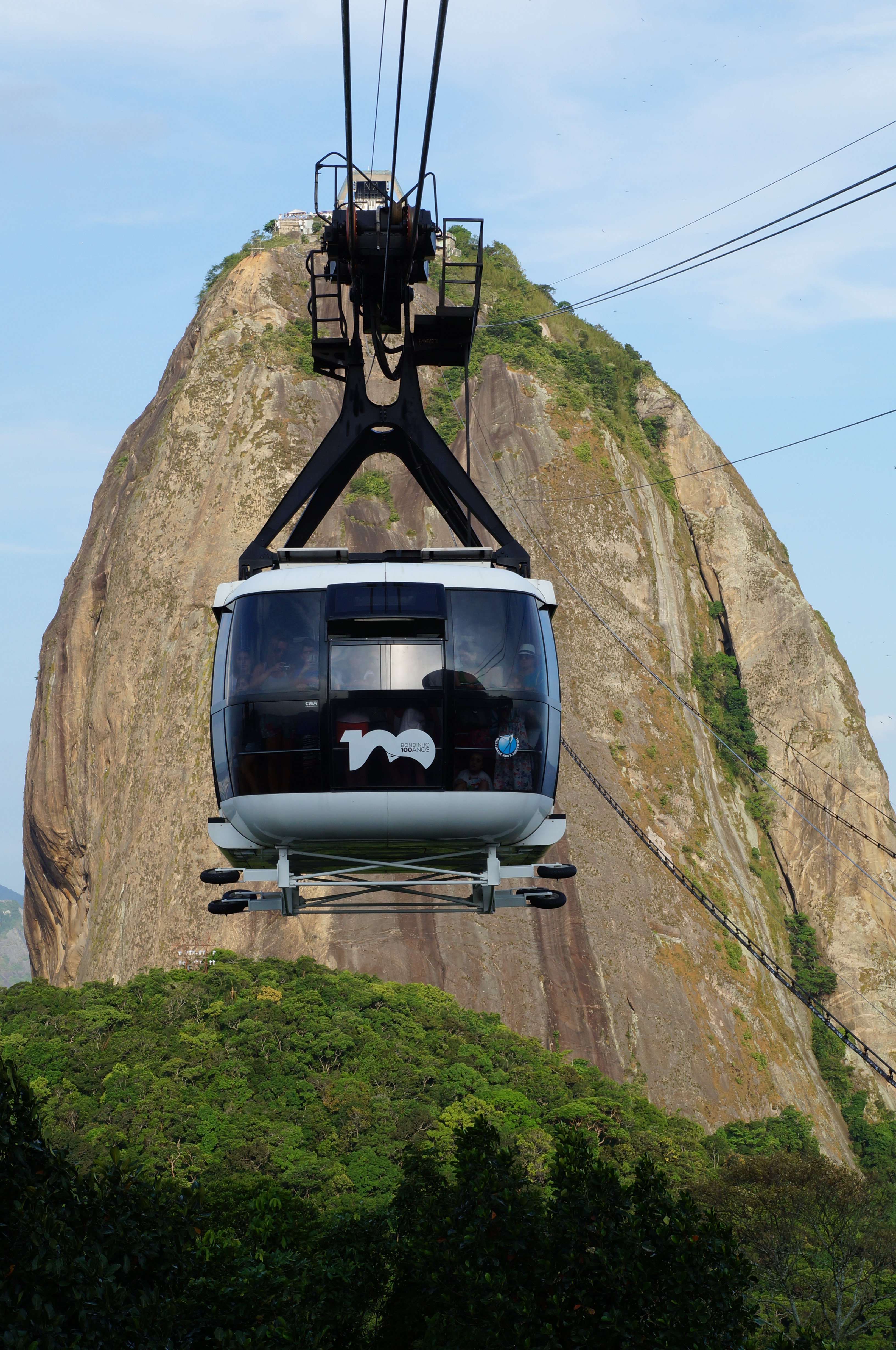 Sua velocidade é 15 metros por segundo e capacidade de 65 passageiros por viagem